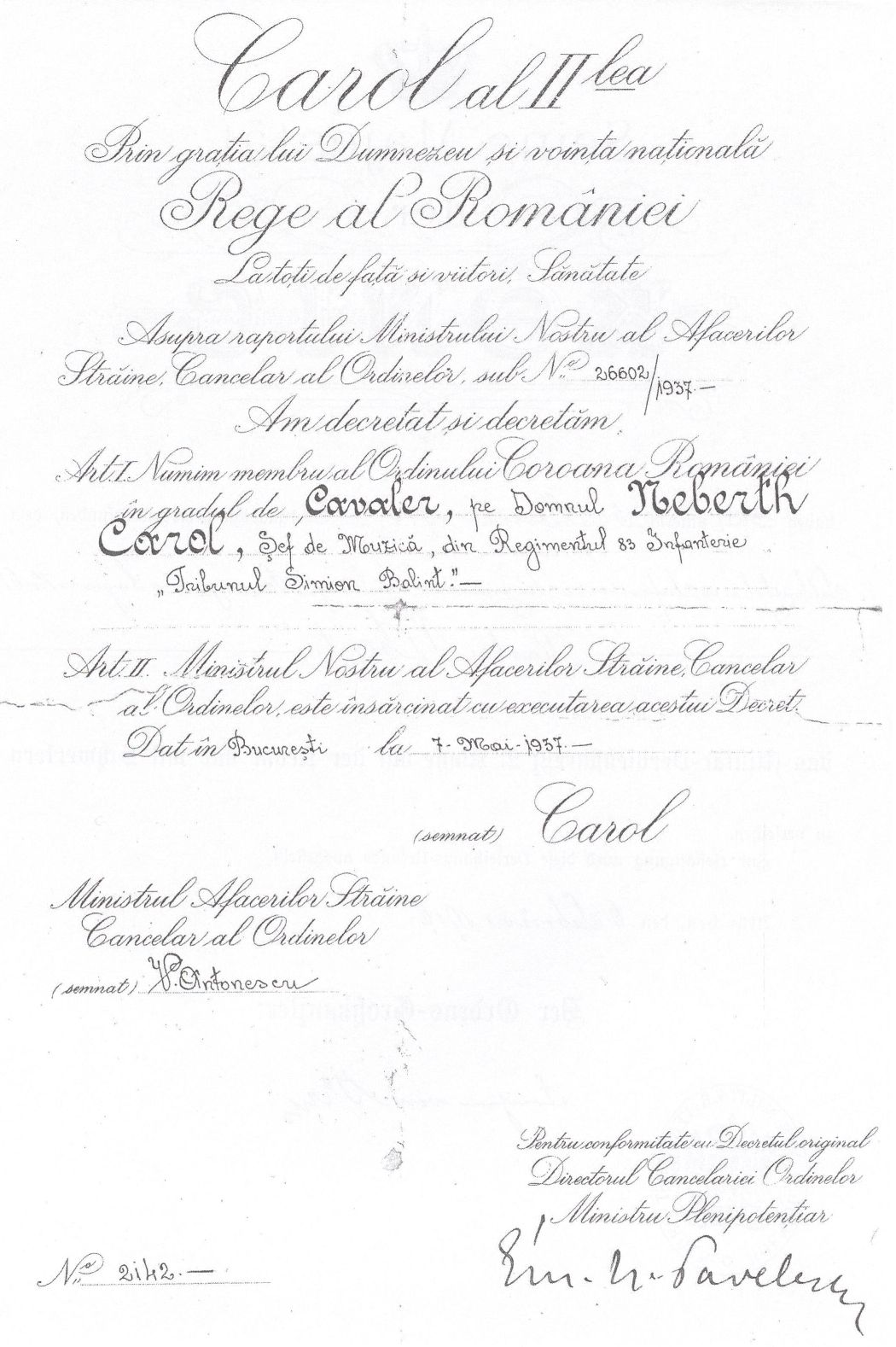 Vyznamenání od rumunského krále Carola II., 1937